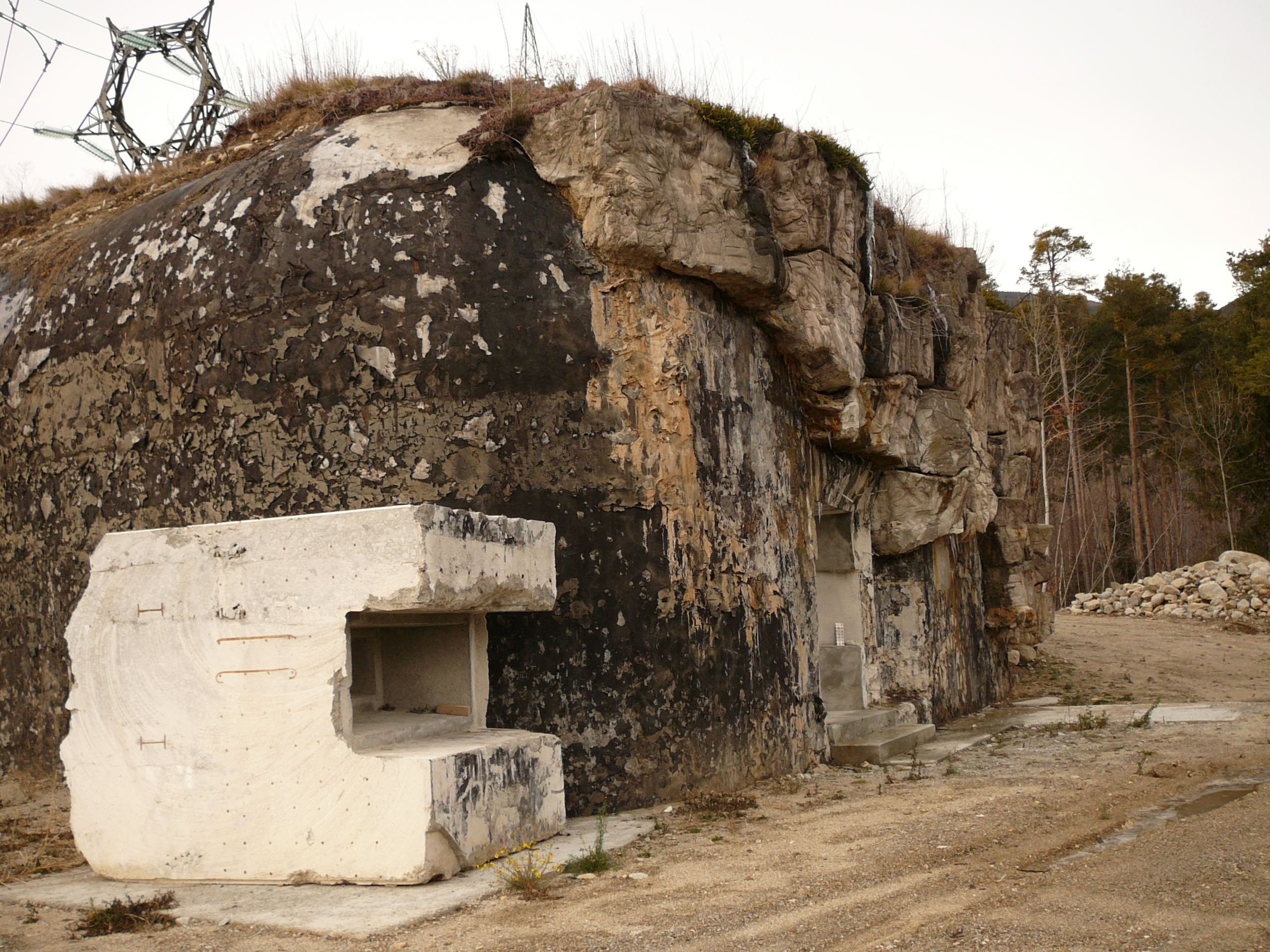 Opera_43.14 Sciaves